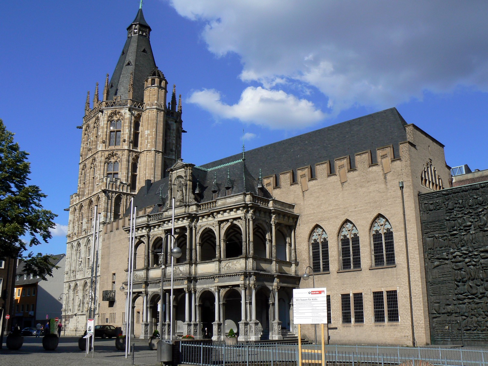 Historisches Rathaus in Köln.